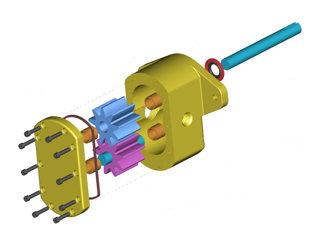 onderdelen uit elkaar gehaald